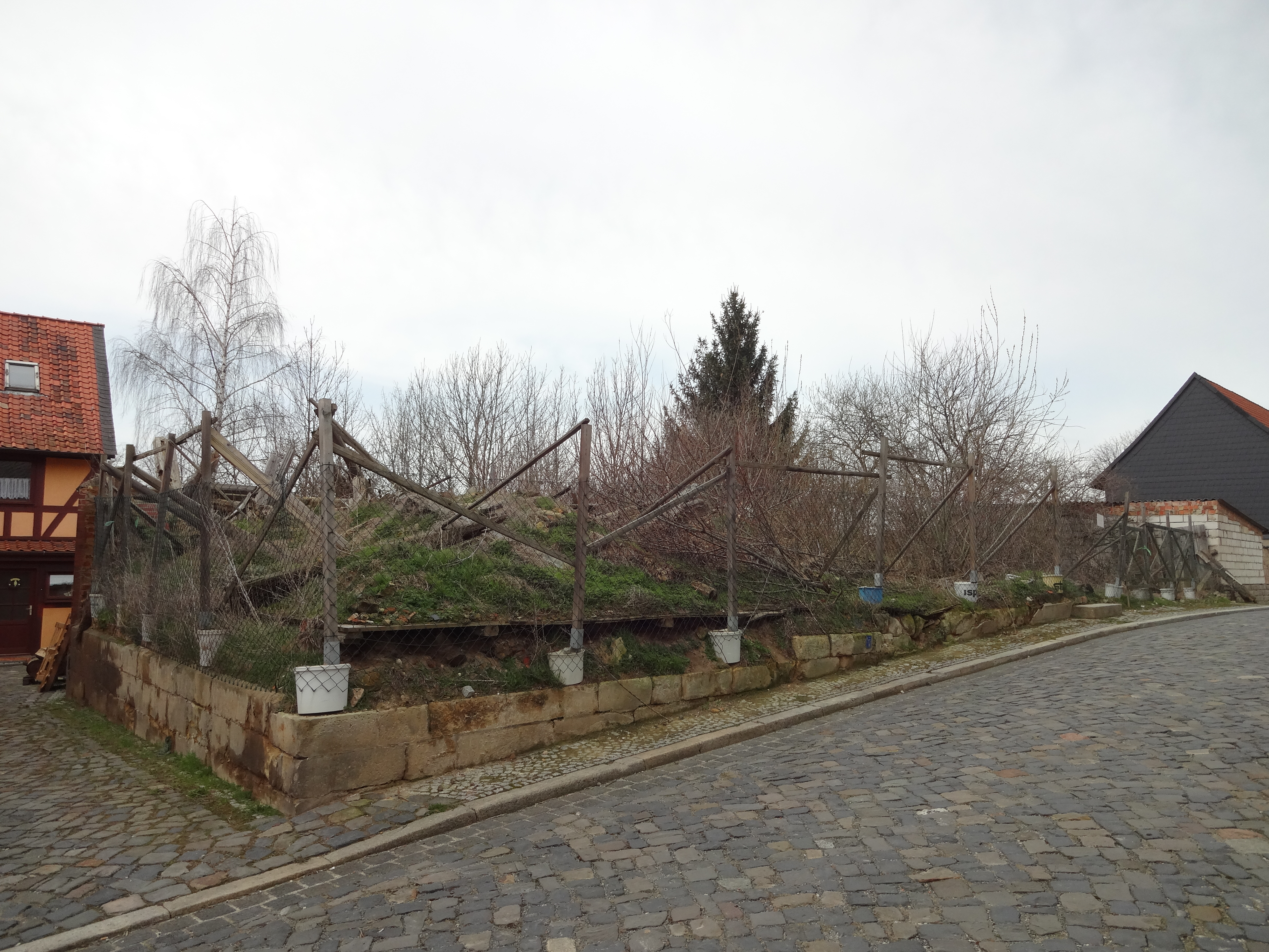 Standort des denkmalgeschützten Fachwerkhaus in der Bergstraße 5 Derenburg, Ortsteil von Blankenburg (Harz); das Gebäude ist abgerissen